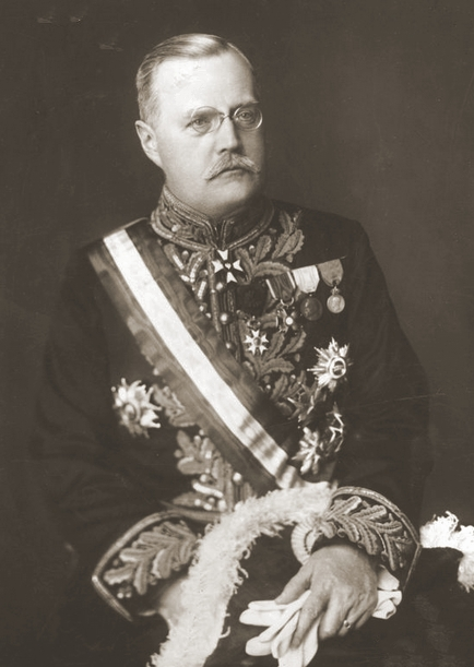 Alfred Wysocki w oficjalnym stroju galowym.